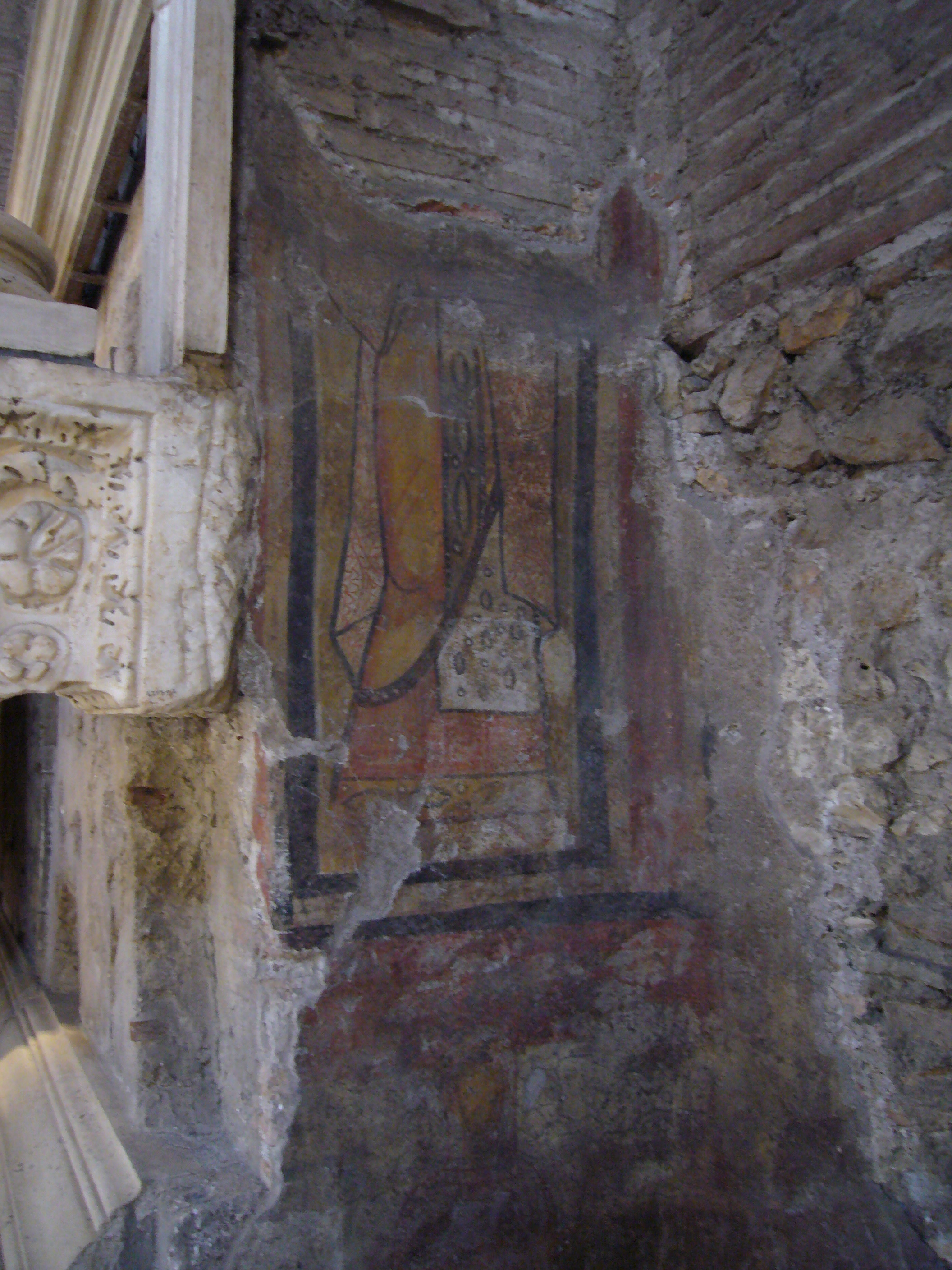 Roma, Curia Iulia. Affreschi della chiesa di S. Adriano recuperati.